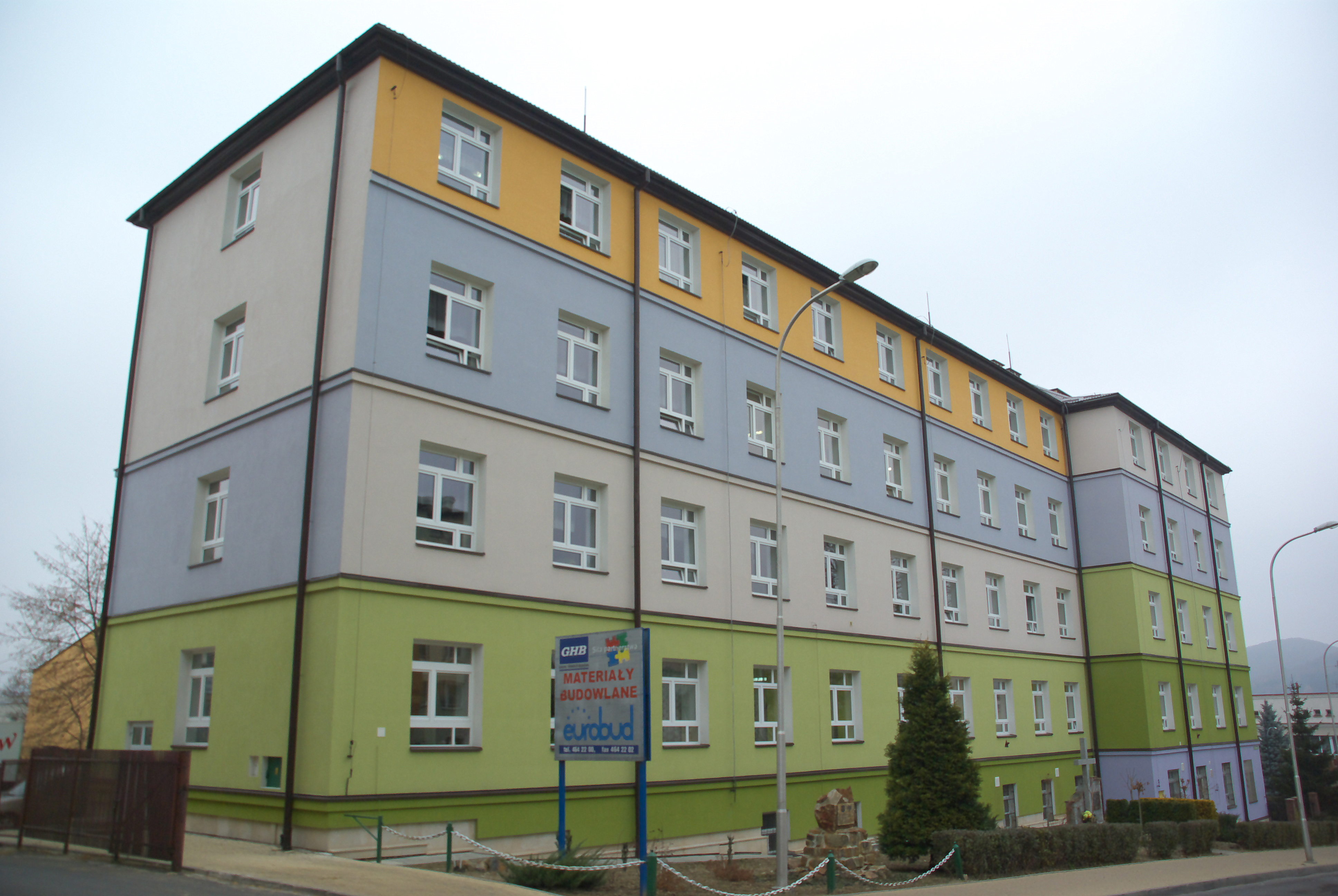 ZSE Sanok view from Sobieskiego